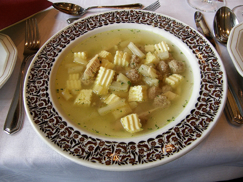 Die Hochzeitssuppe in Bramstedt